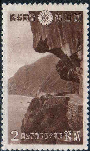 日本の植民地であった次高タロコ国立公園のうち、台湾東海岸の清水断崖を描く2銭切手